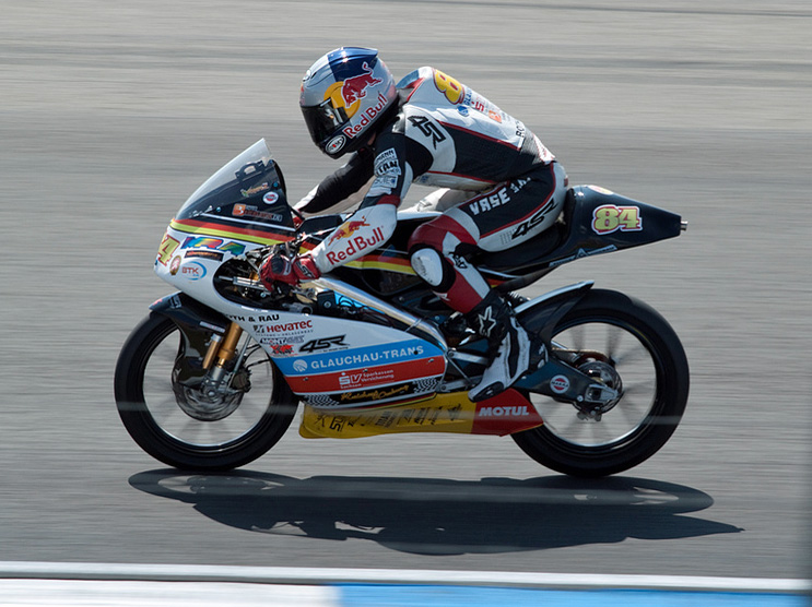 Jakub Korfneil ad Assen nel 2010.